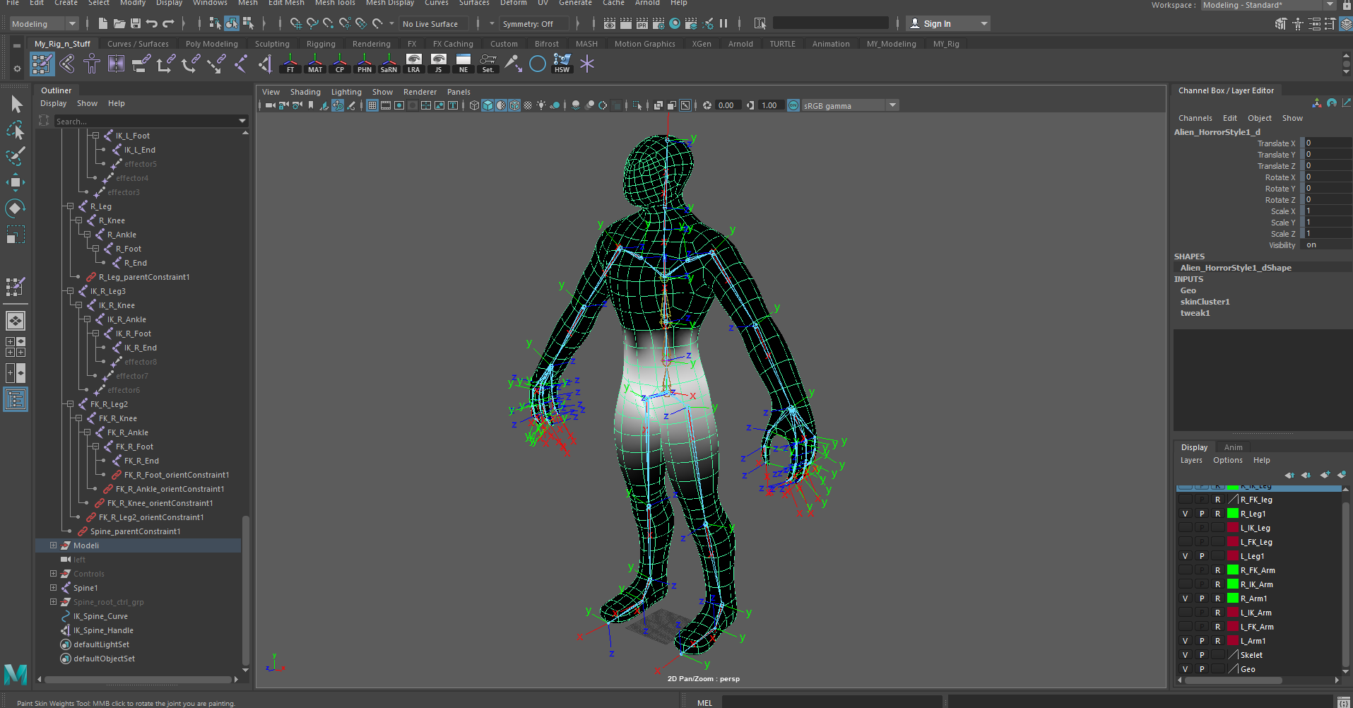 Srpski (latinica): SkInovanje 3D modela